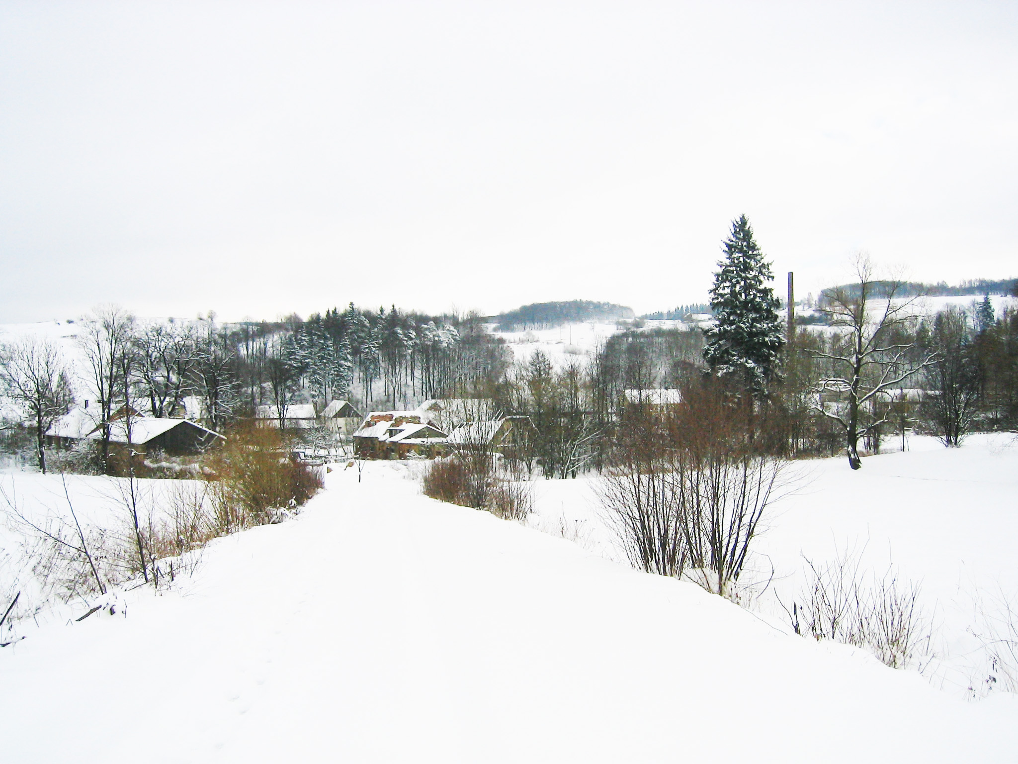 Widok środkowej części Miłoszowa. Na pierwszym planie ruiny pałacu.